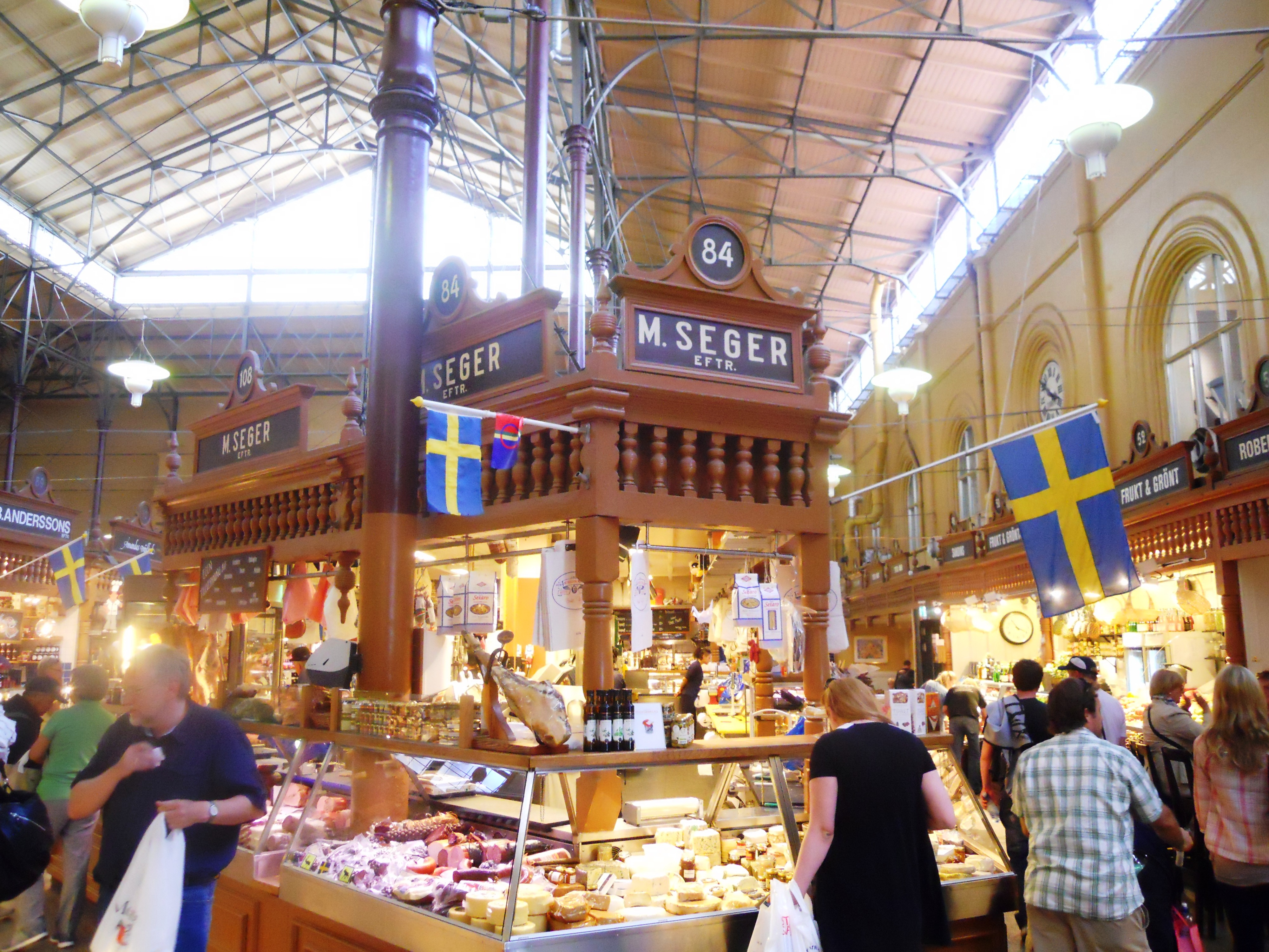 Le interieur